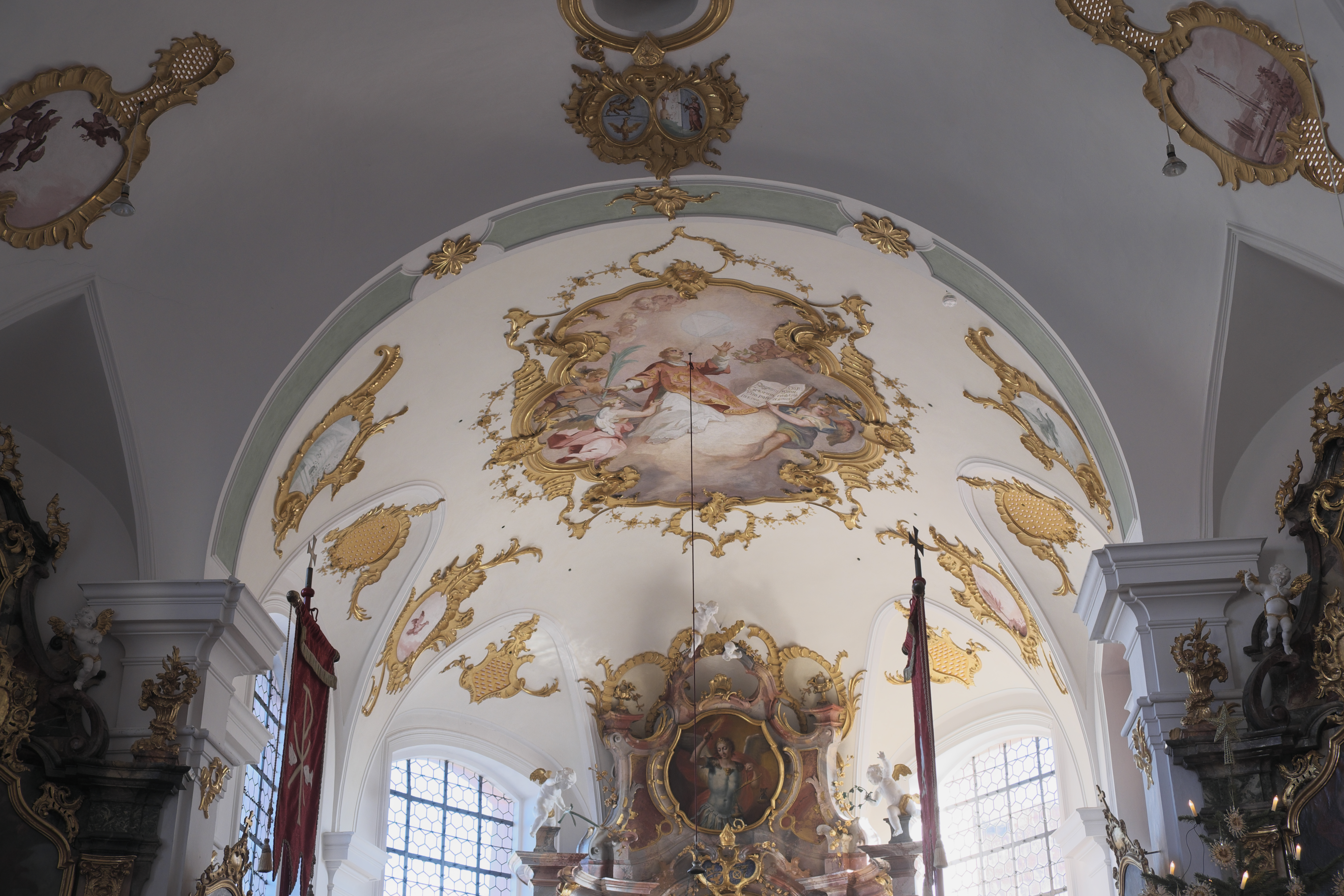 Katholische Filialkirche St. Laurentius in Pflugdorf (Vilgertshofen) im oberbayerischen Landkreis Landsberg am Lech (Bayern/Deutschland), Deckenfresken um 1757, Johann Baptist Zimmermann und seiner Werkstatt zugeschrieben; Darstellung: Szenen der Legende des heiligen Laurentius